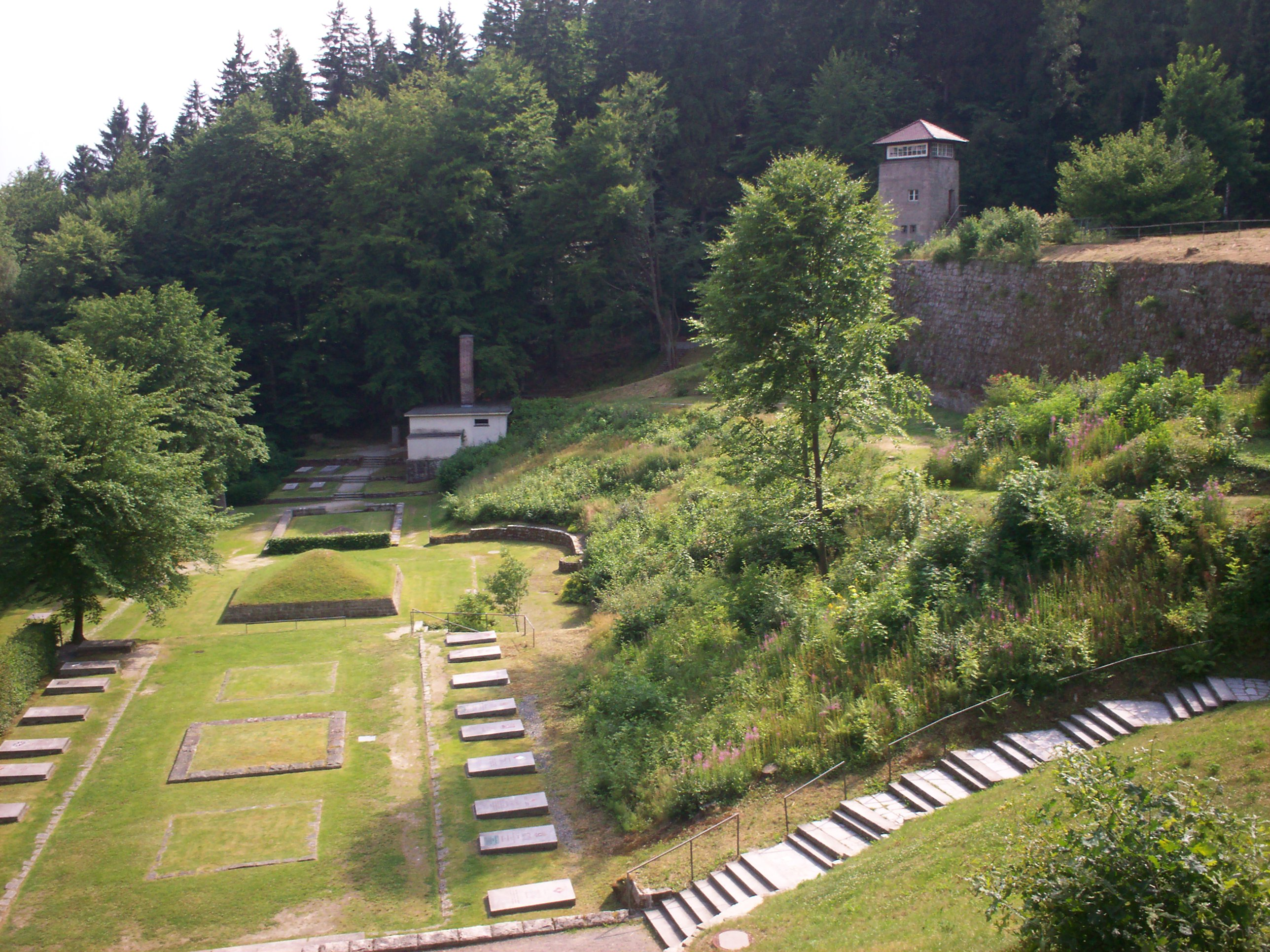 Krematorium und Wachturm im KZ Flossenbürg, 2008